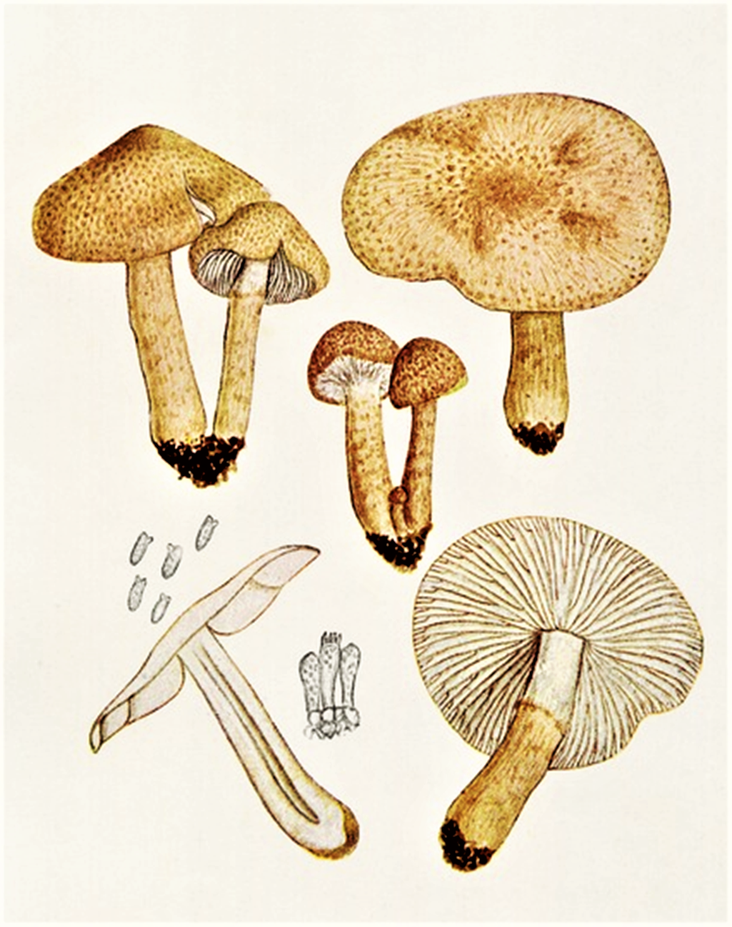 Giacomo Bresadola: Lepiota boudieri (1881)